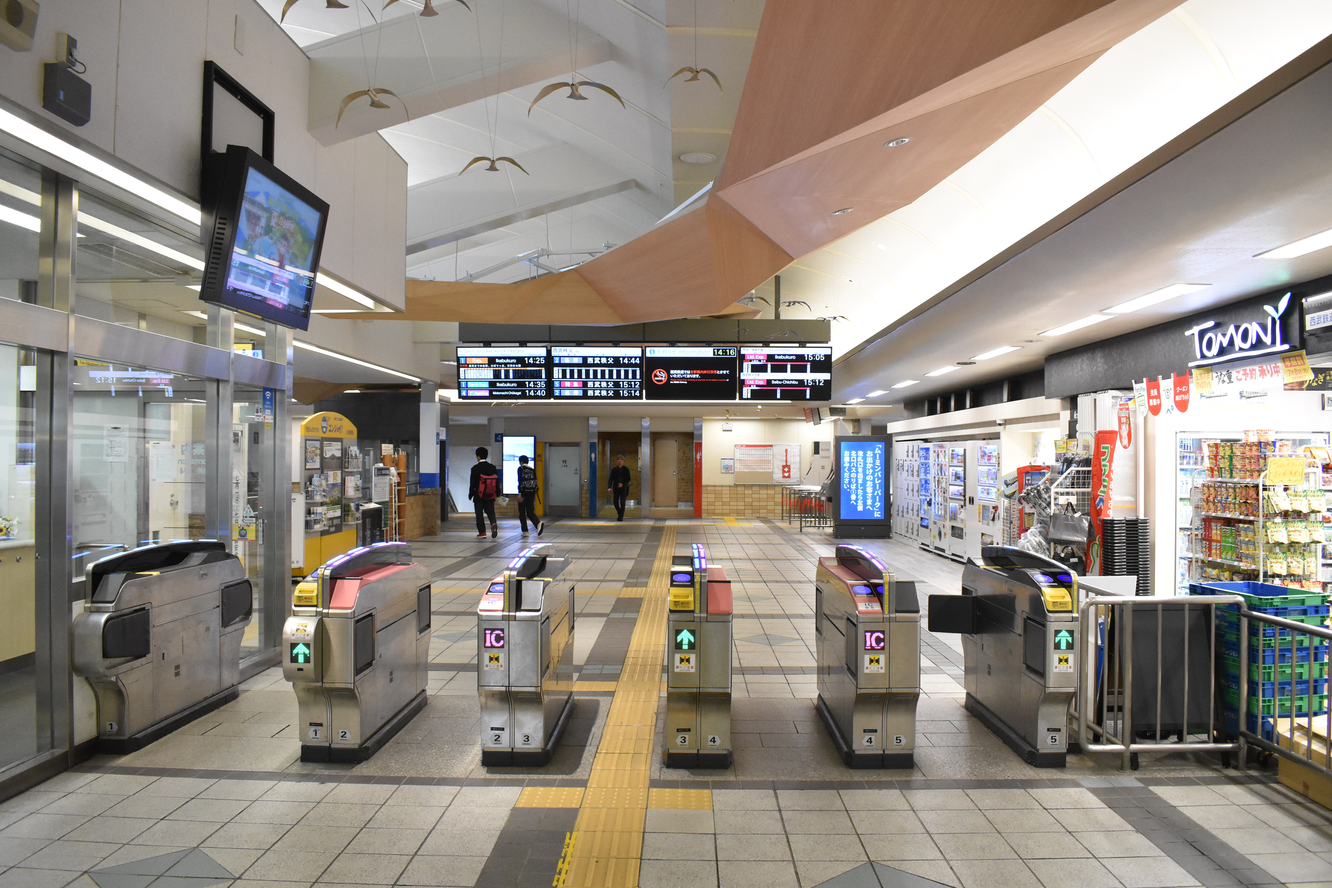 西武線 飯能駅